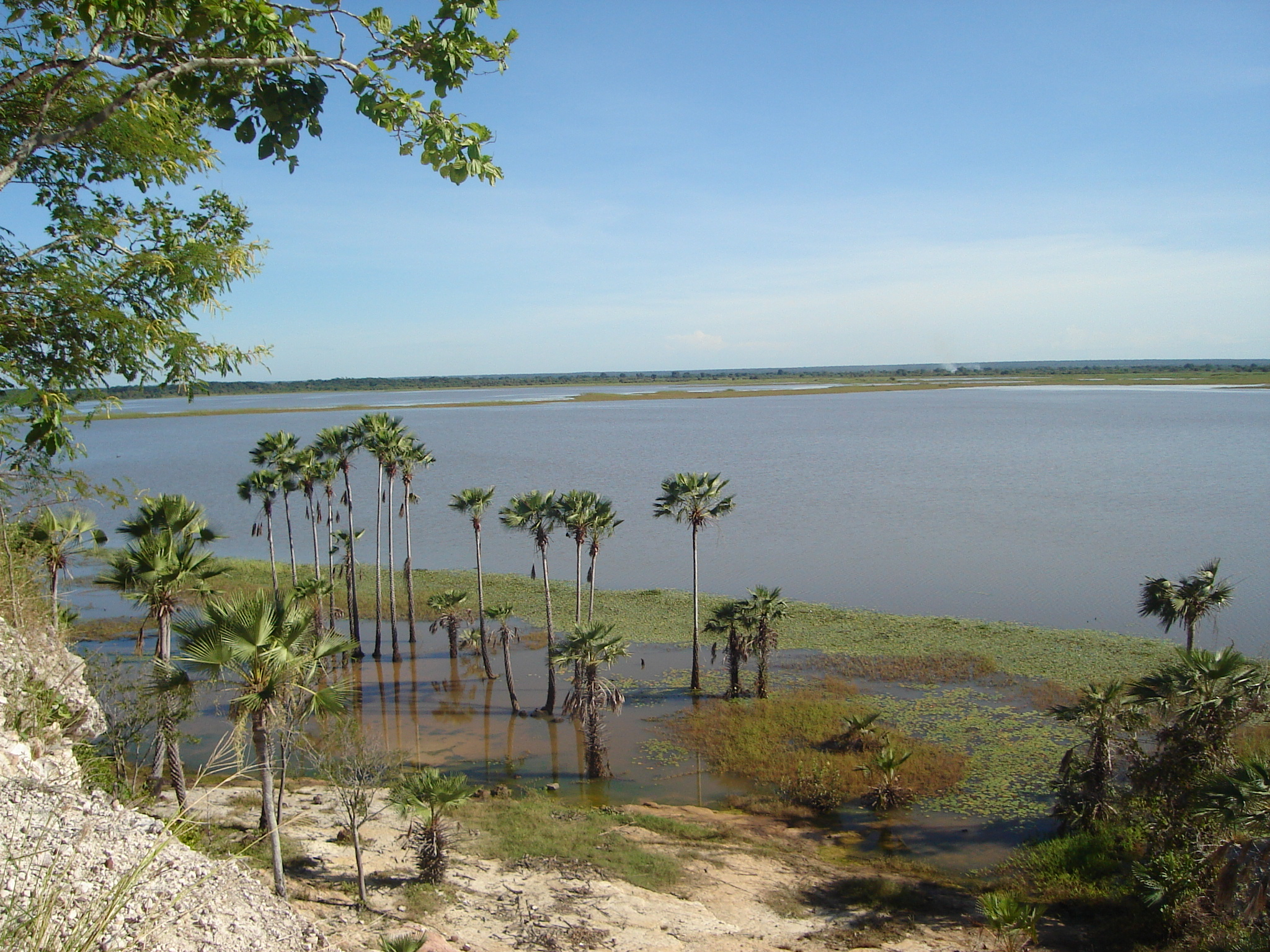 Vista da Lagoa do Cajueiro - Pedra Branca